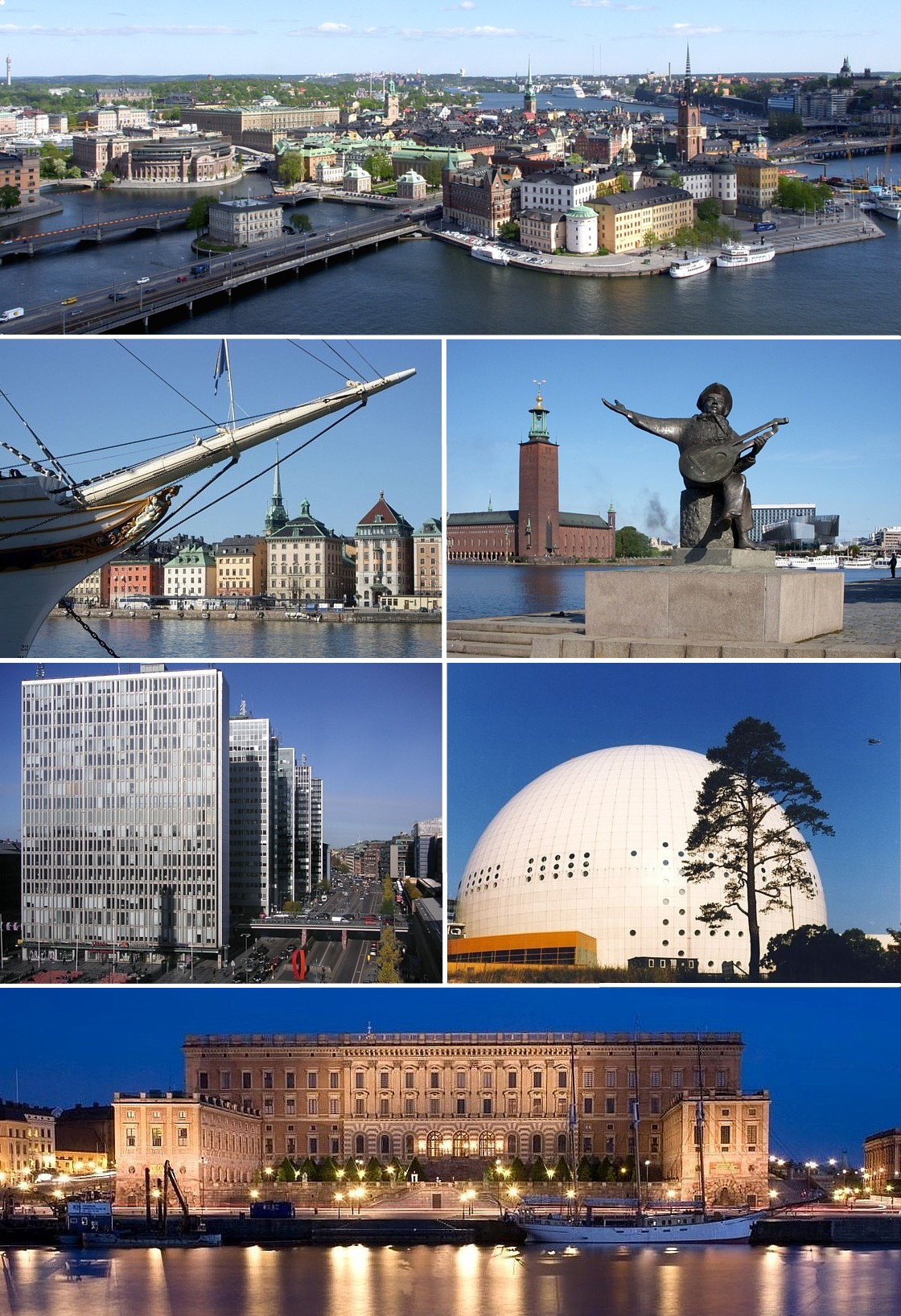 Kollage för STOCKHOLM